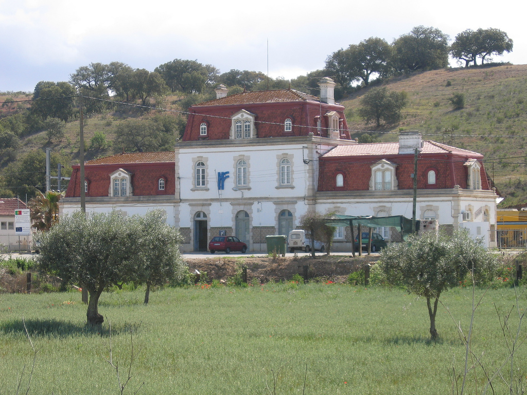 Station und Eisenbahnkreuz Funcheira im Baixo Alentejo